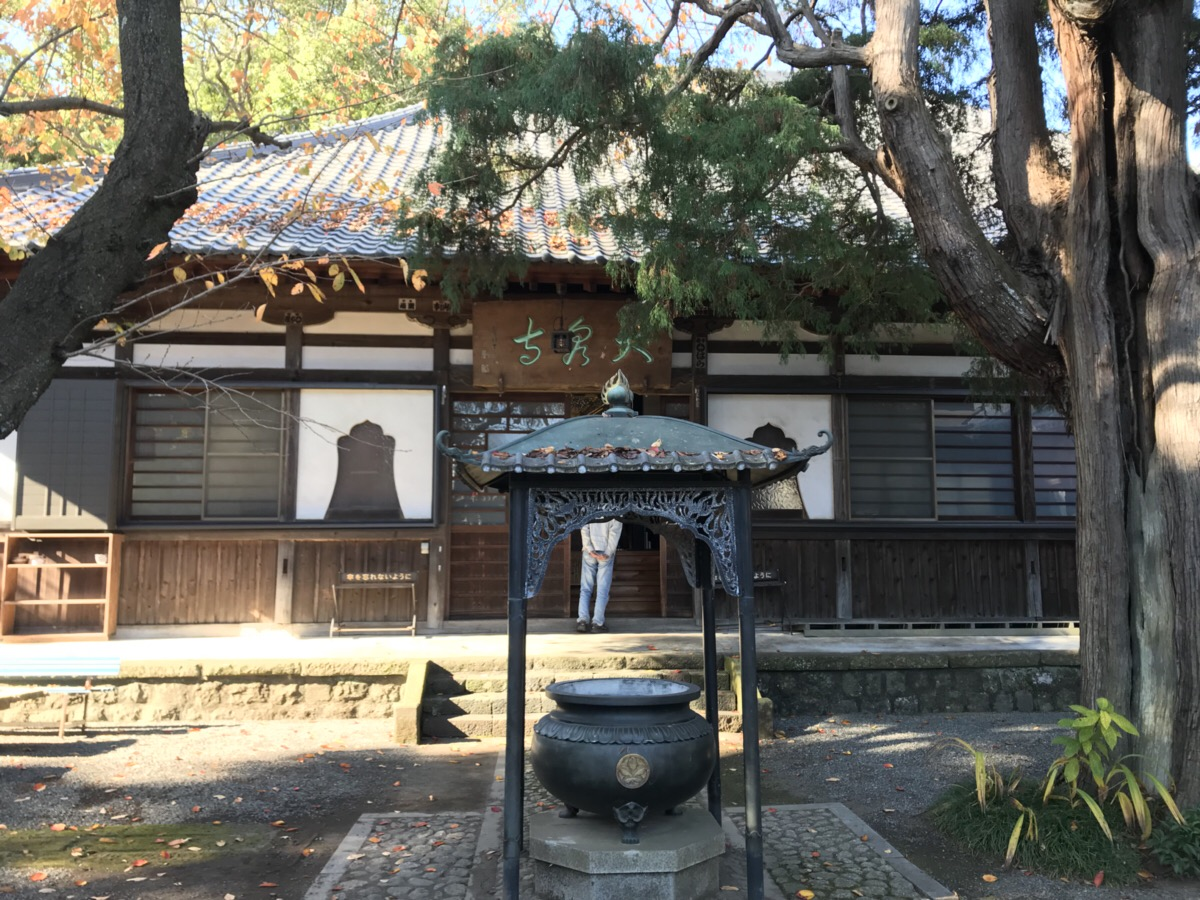 大泉寺本堂